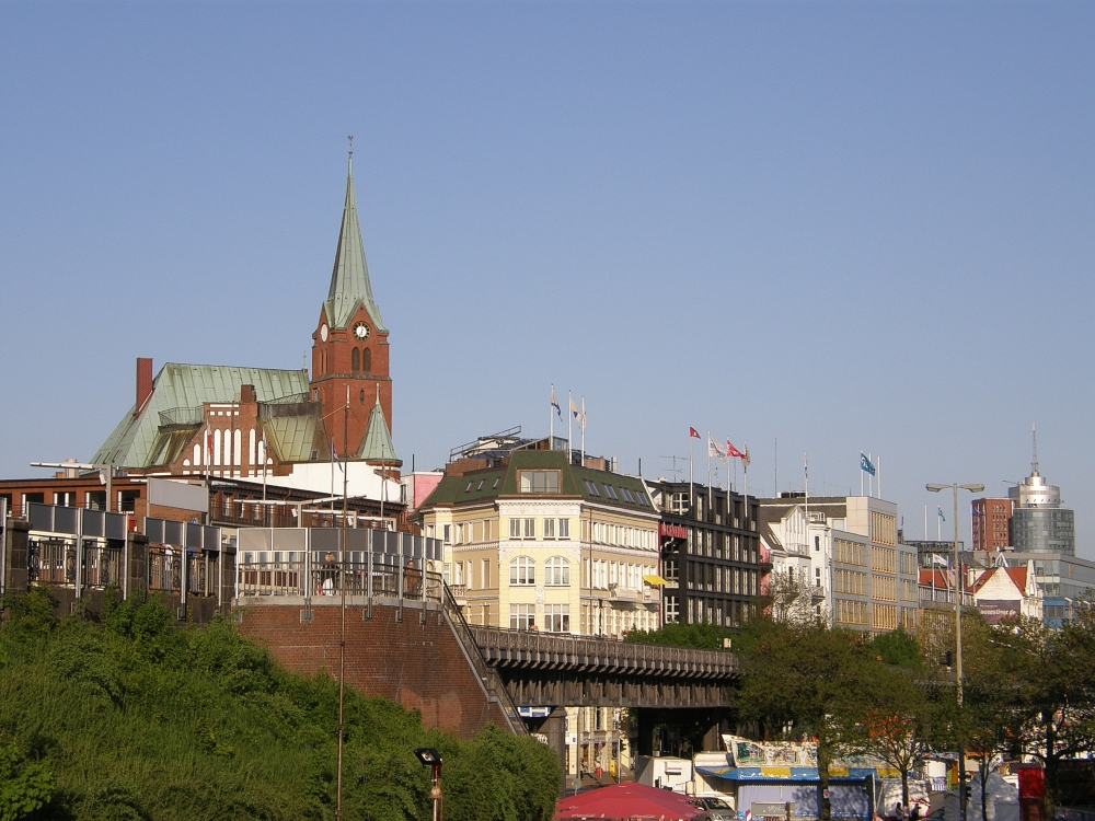 Die Häuser an den Landungsbrücken in Hamburg. Vorne der Hochbahn-Bahnhof, dahinter die schwedische Seemannskirche.